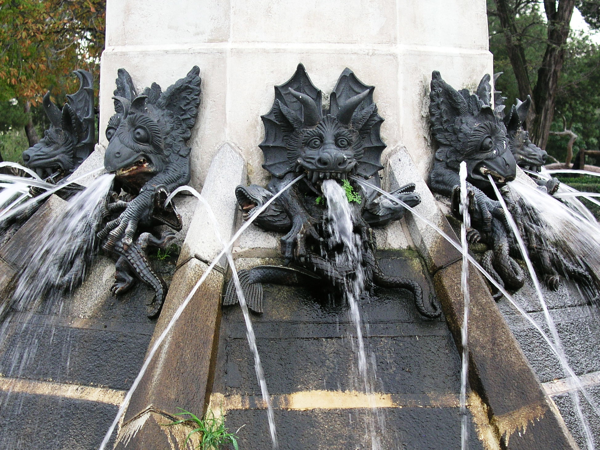 Jardines del Buen Retiro, Madrid, Spain. Ángel Caído.